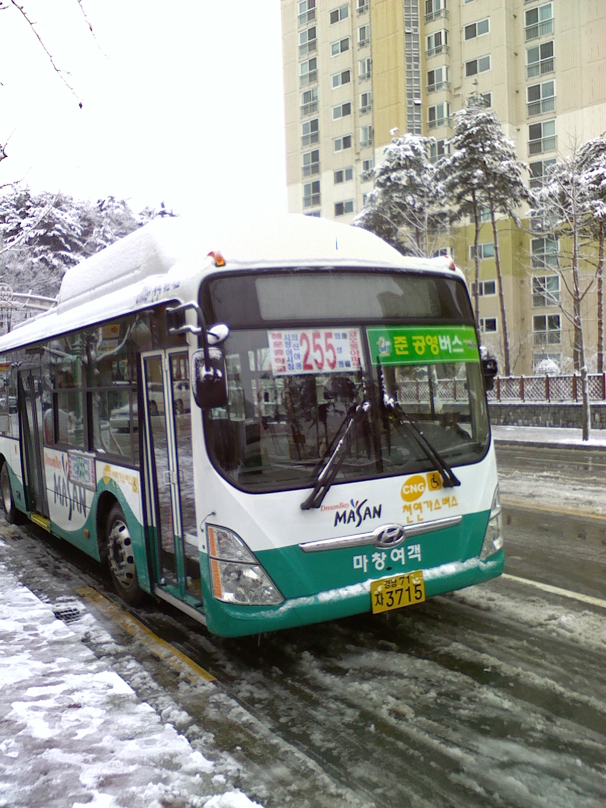 마산시 해운동과 내서읍 코오롱아파트를 오가는 마창여객 소속 255번 버스, 마산시 내서읍 코오롱 아파트